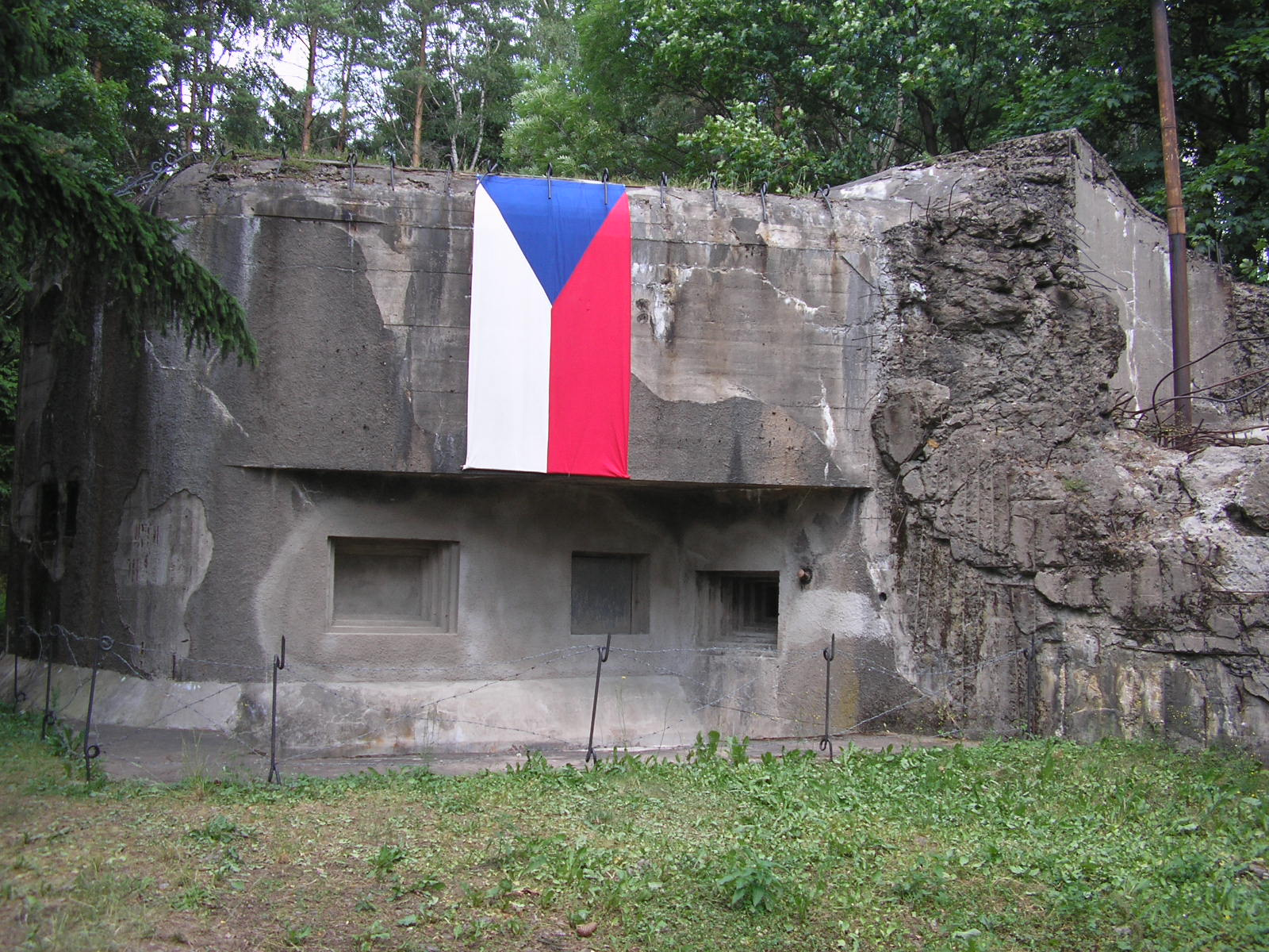 Pěchotní srub N-S 78 Polsko